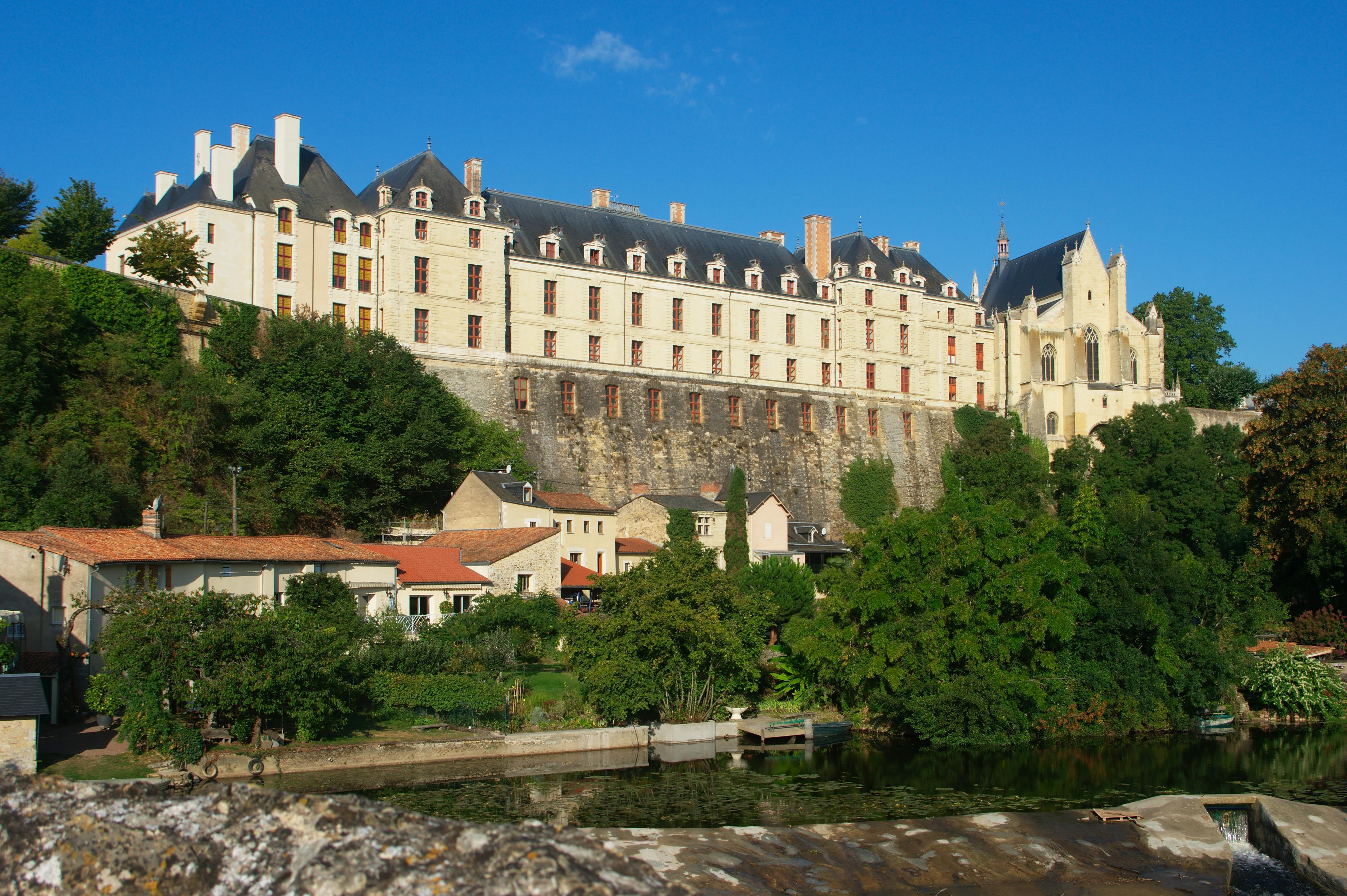 Collégiale Notre-Dame du château de Thouars (Classé)